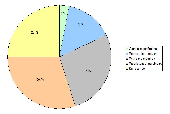 Propriété des terres agricoles, dans le district de Chittagong, division de Chittagong, Bangladesh.